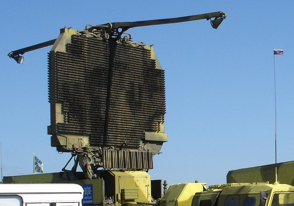 S-300 / SA-20 Radar